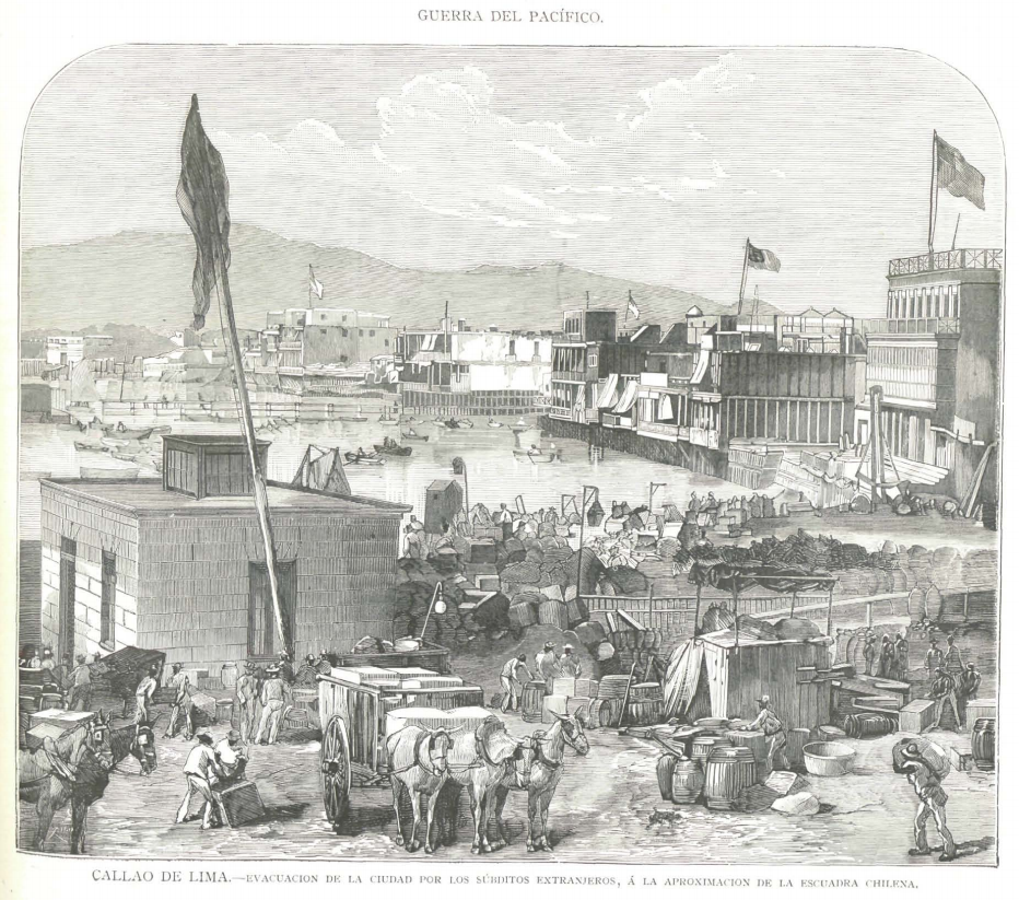 Sudbitos extranjeros evacuan el Callao tras la llegada de la escuadra chilena, 1881